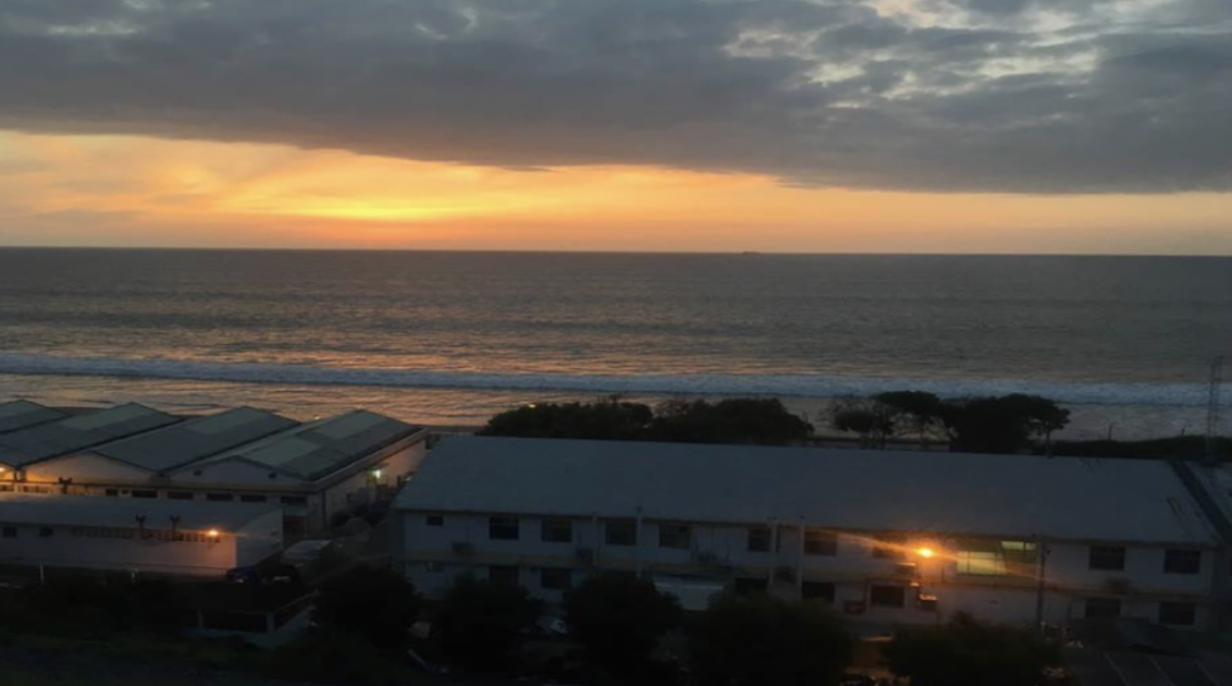 El Islote El Pelado se localiza a aproximadamente 3,69 millas náuticas de CENAIM